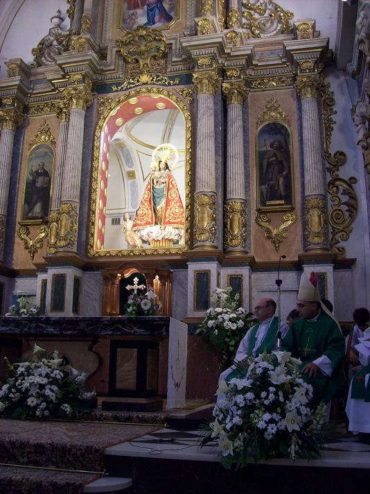 Misa 2º aniversario en Villar, con la Virgen de la Paz.